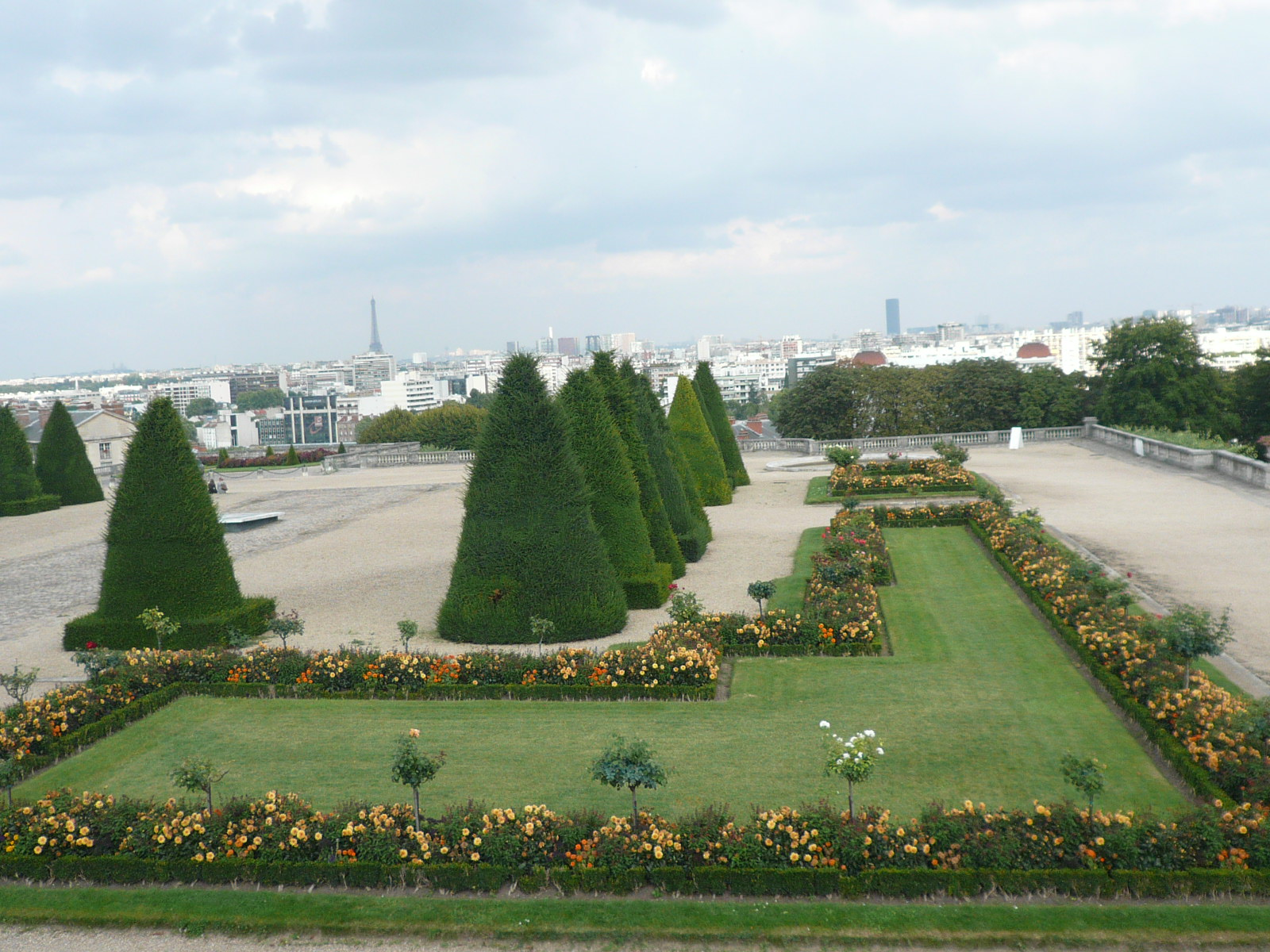 Vue sur Paris depuis la terrasse du château